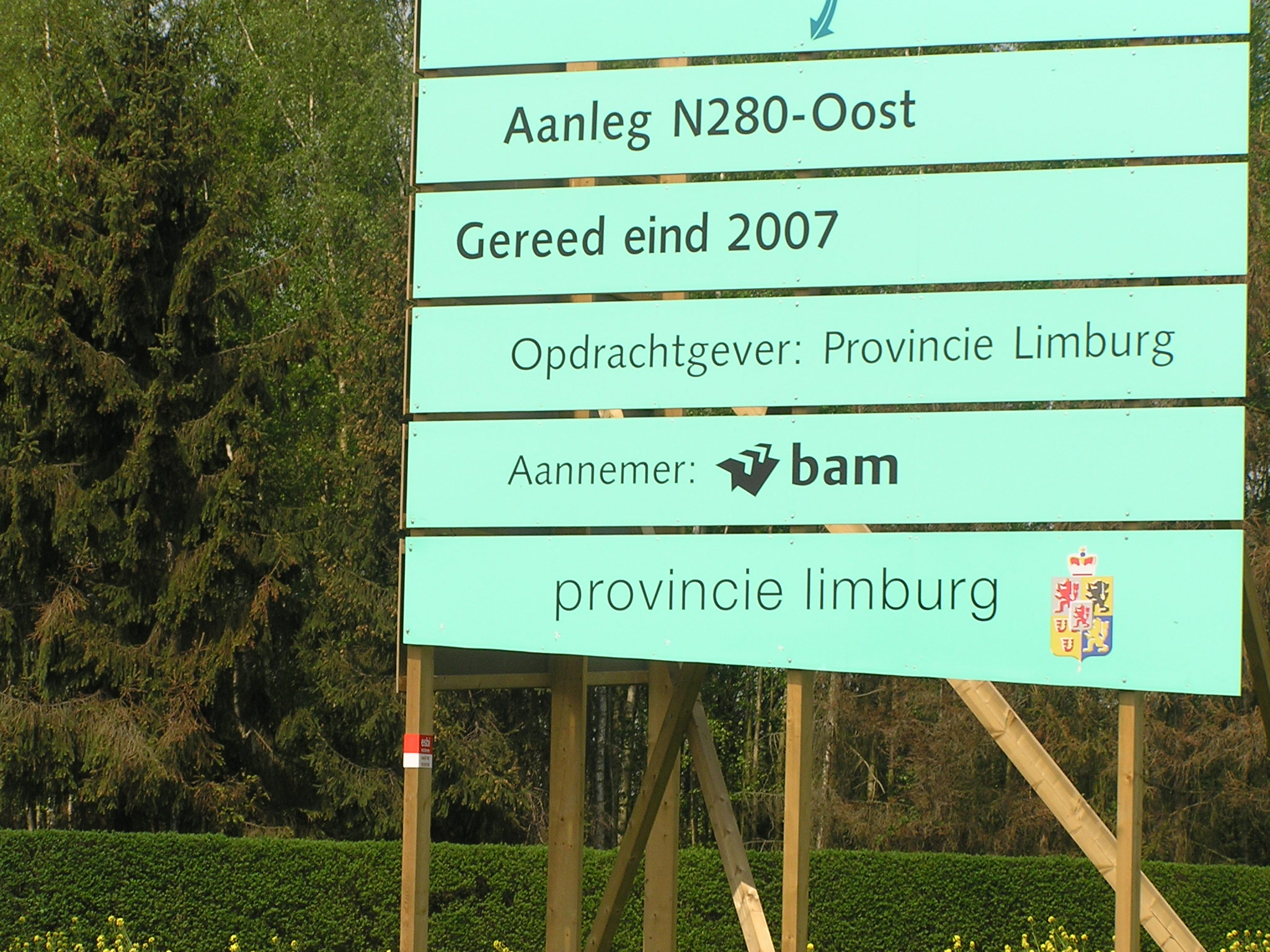 Bord aanleg N280-Oost